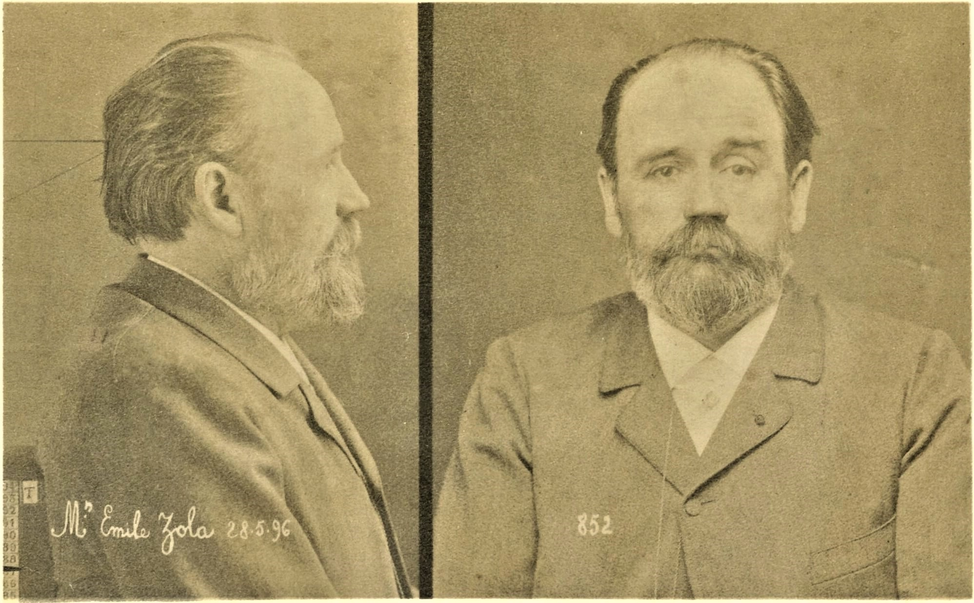 Photographique anthropomorphique d'Émile Zola au moment de ses procès liés à l'Affaire Dreyfus.